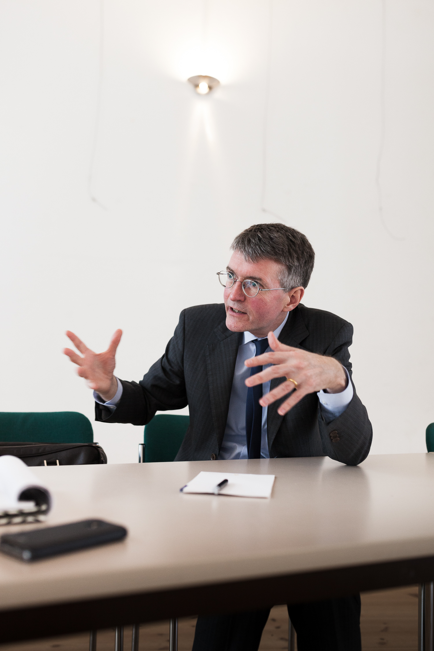 Christian Waldhoff referiert zum Thema Staatsrecht im Rahmen des JMWS 2017 in Berlin.